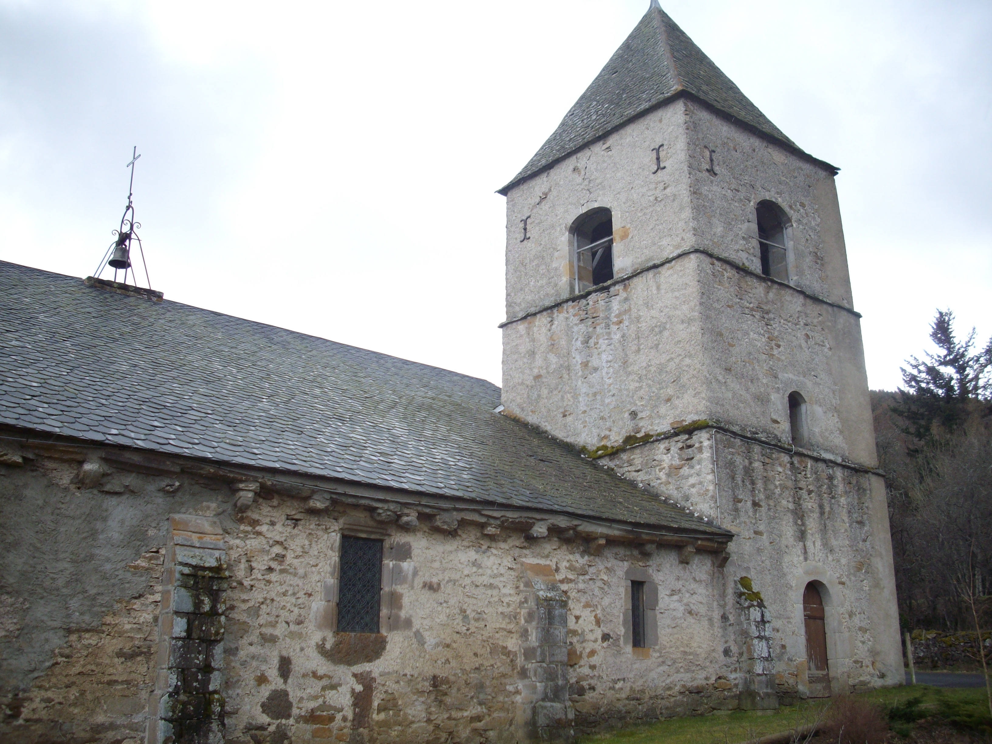 Eglise de Mazoires